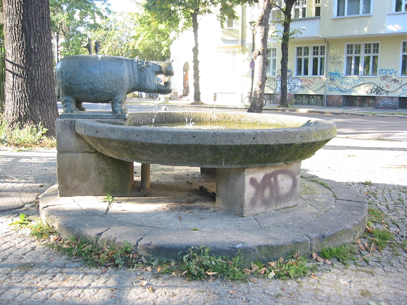 Nilpferdbrunnen (1978) at Wühlischplatz, Berlin/Germany